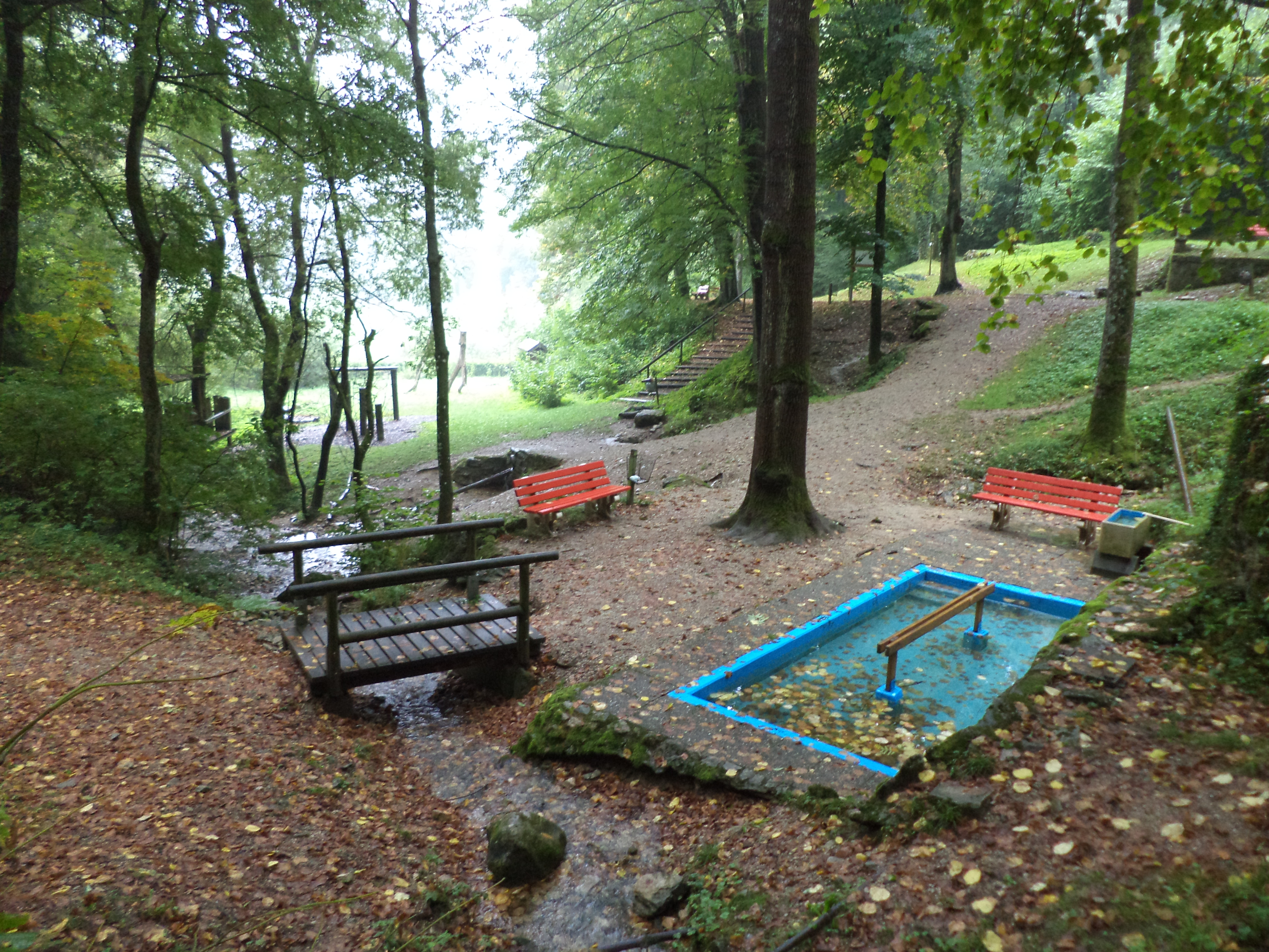 Der Platz mit Kneippanlage und Kinderspielplatz an der Muschelquelle bei Streitberg